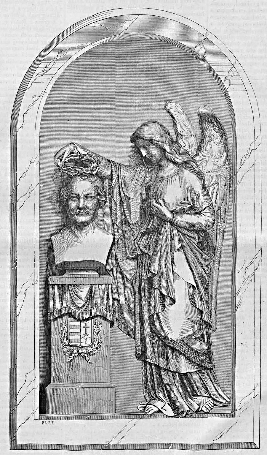 Jeszenák János politikus, kormánybiztos, az 1848–49-es szabadságharc vértanújának síremléke. (Alexi Károly Ede alkotása) Rusz Károly metszete. (Vasárnapi Ujság, 1869. december 5.)